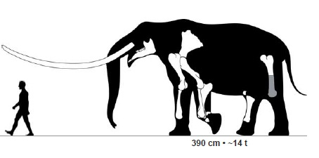 Mammut borsoni from Milia (Greece).